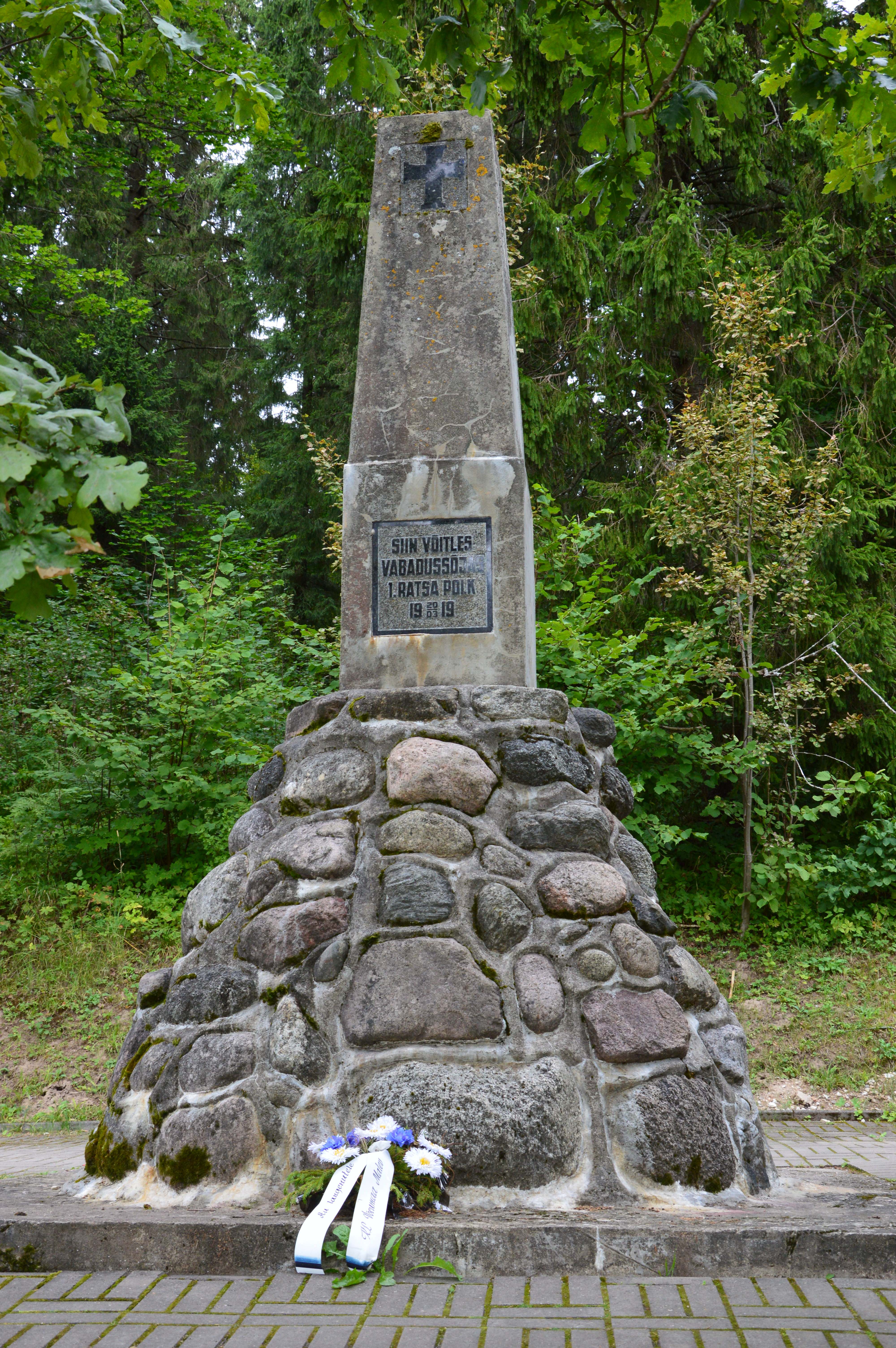 Vabadussõja Munamäe lahingu mälestussammas